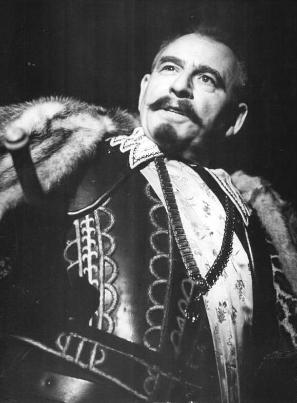 Zentralbild Hochneder 5.4.1962 "Wallenstein" im Deutschen Theater. Das Deutsche Theater Berlin hat die Wallenstein-Trilogie von Friedrich Schiller, Bühnenfassung von Karl Paryla, ab 5.4.1962 wieder in den Spielplan aufgenommen. UBz: Wolfgang Heinz als Wallenstein, Herzog von Friedland.